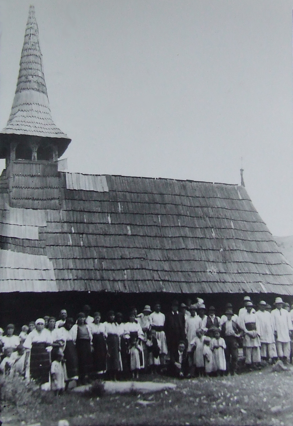 Biserica de lemn din Borleasa, judeţul Bistriţa Năsaud.